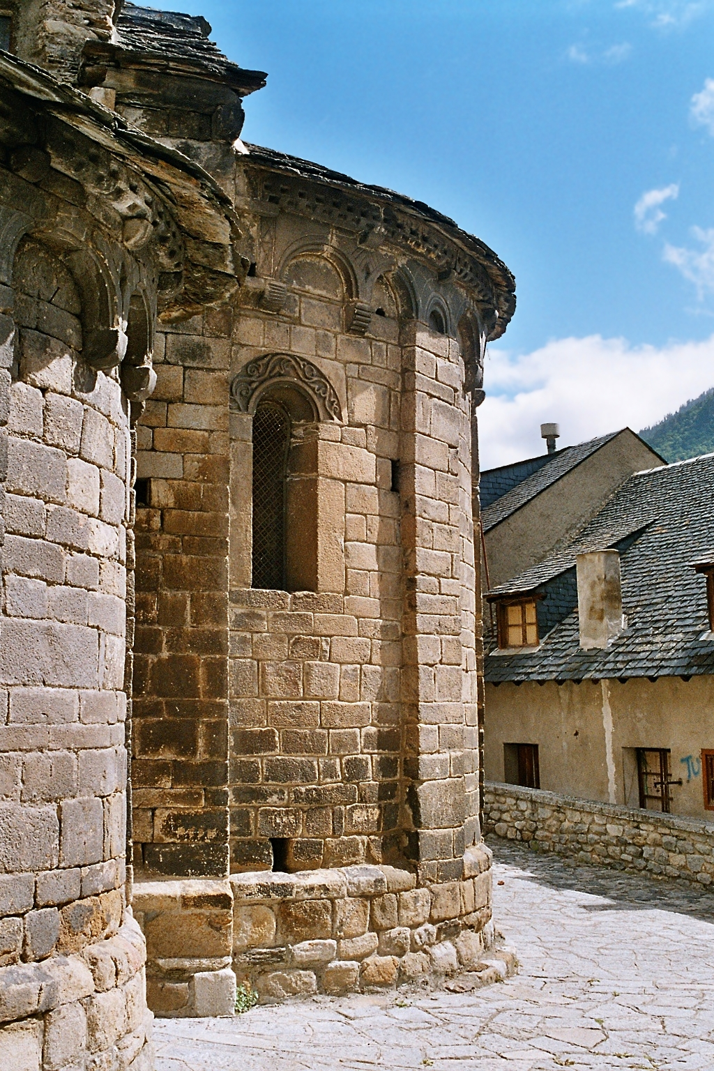 Espagne - Val d'Aran - Église de l'Assomption de Bossòst